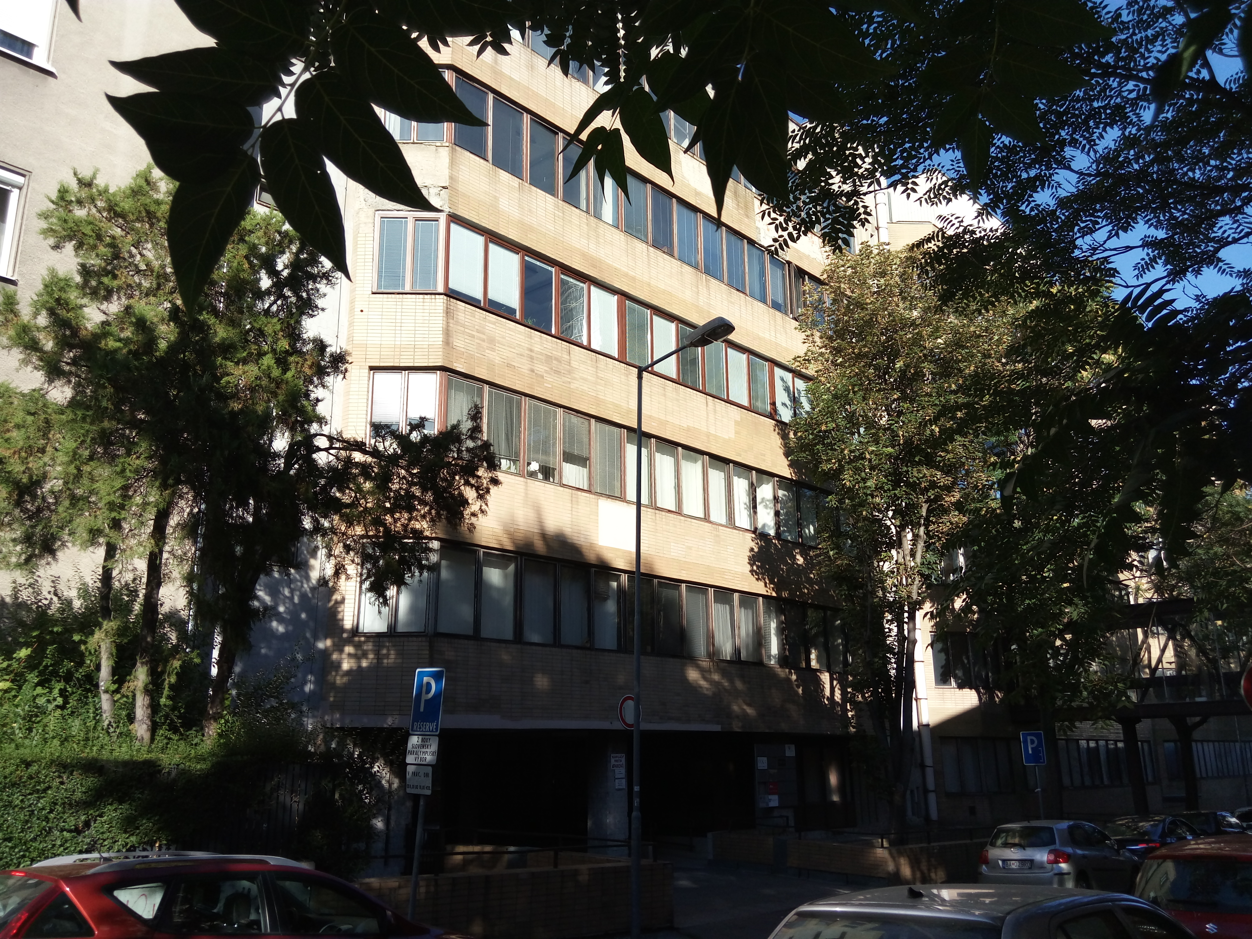 Benediktiho 5, Staré Mesto, Bratislava